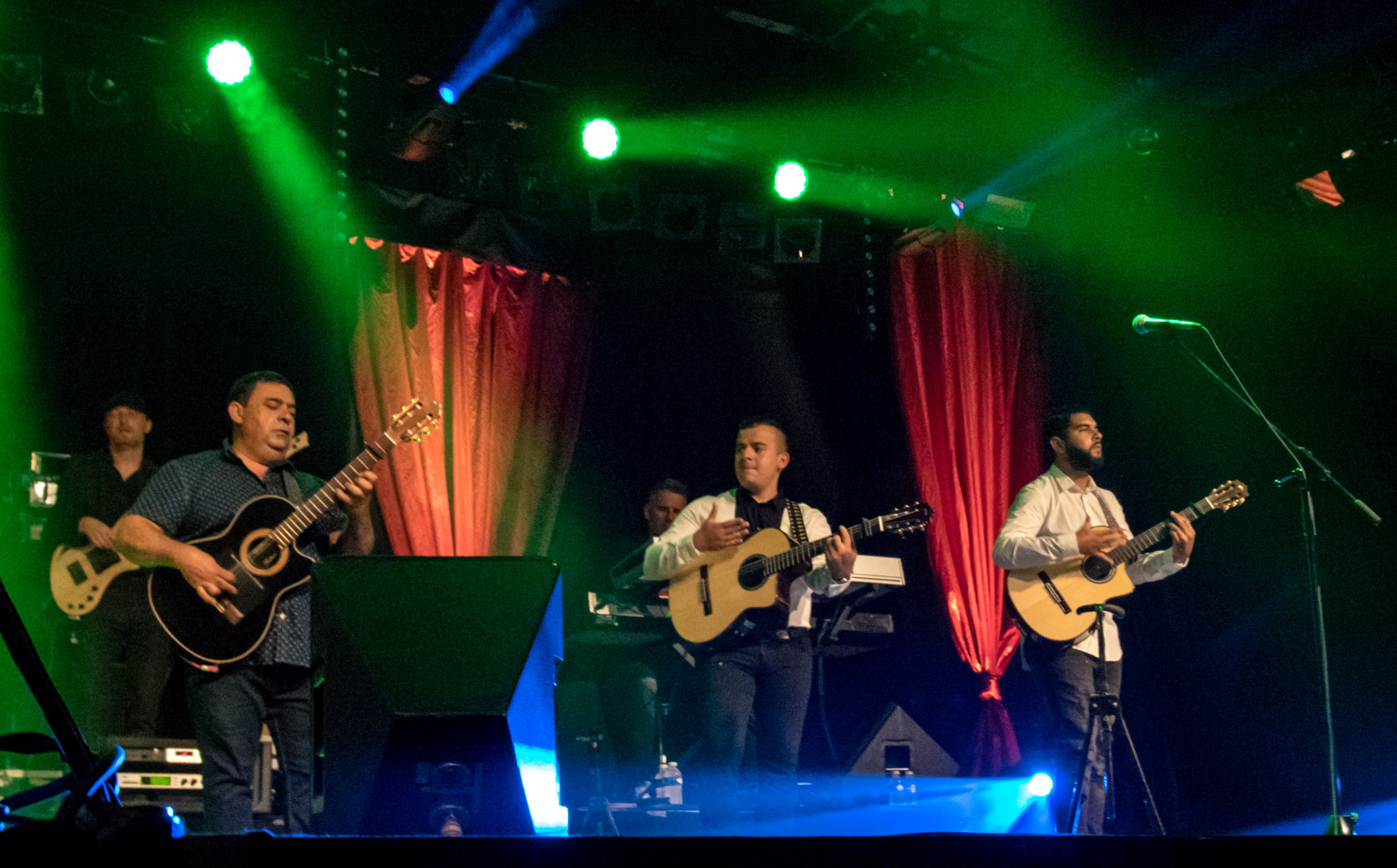 Bilder vom Zelt Musik Festival 2016 in Freiburg im Breisgau Gipsy Kings